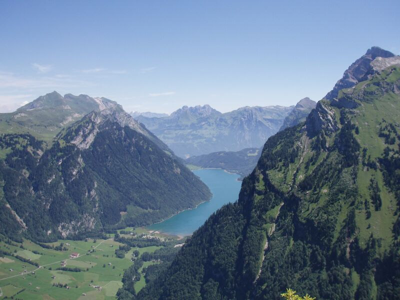 Klöntalersee fotografiert von der Silberen, im Hintergrund (Bildmitte) der Mürtschenstock